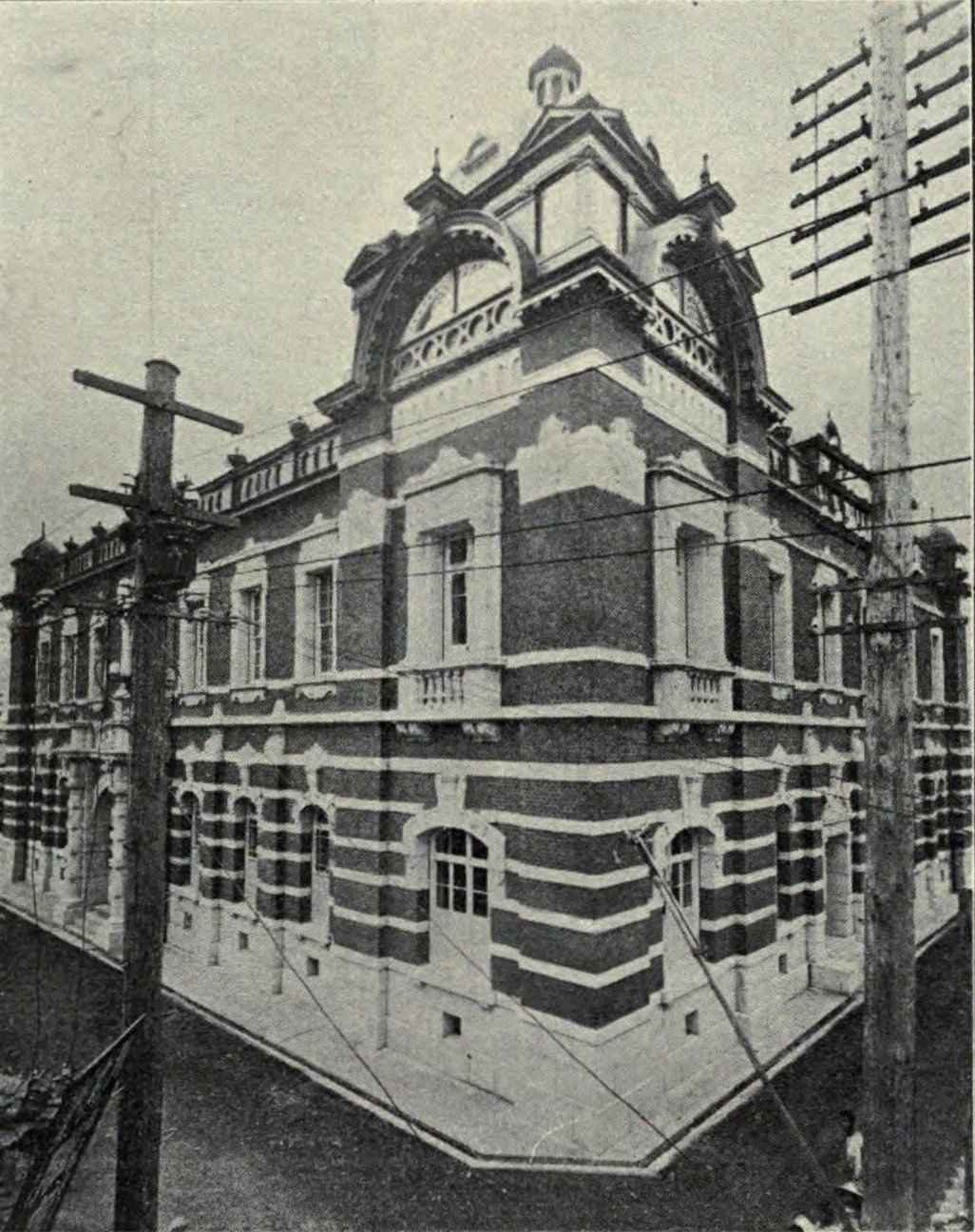 浪速銀行 明治時代